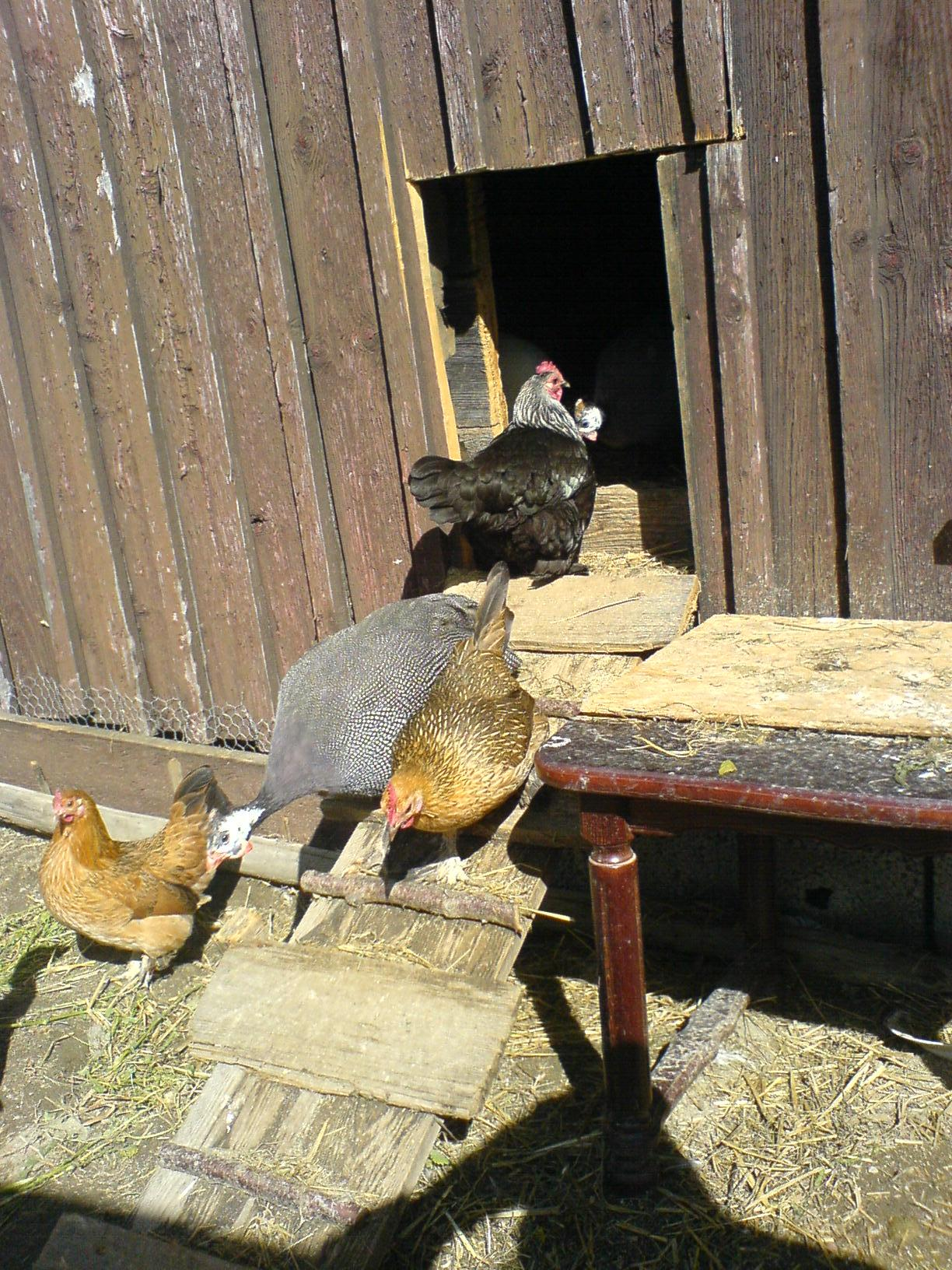 hønsestige